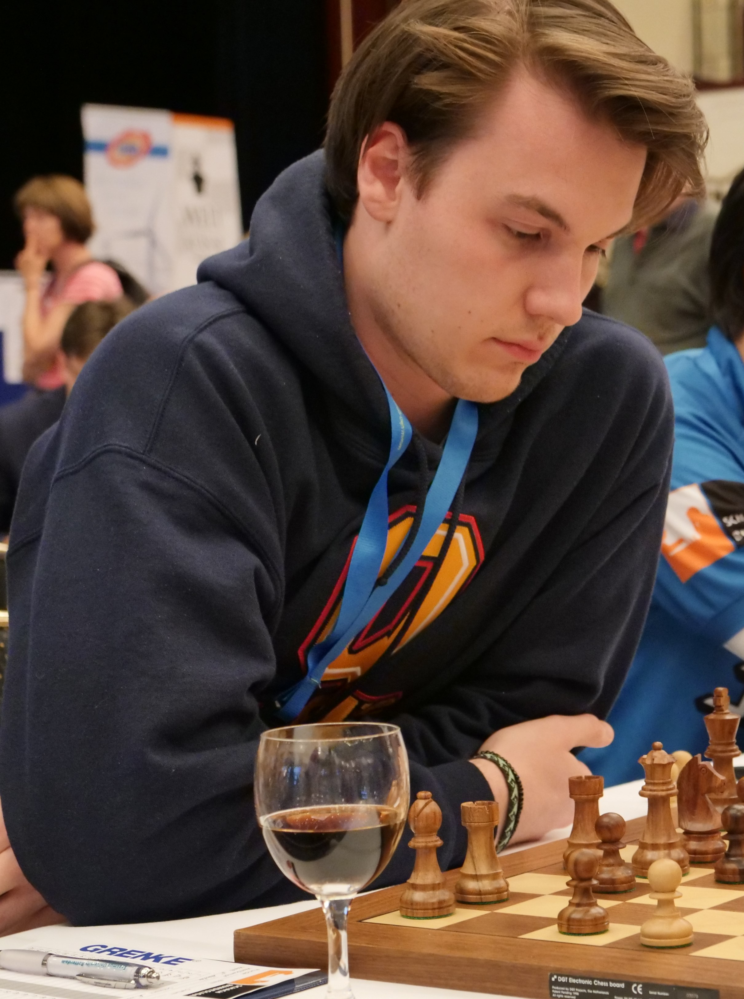 Van Kampen in der Bundesliga-Endrunde 30-4-2018